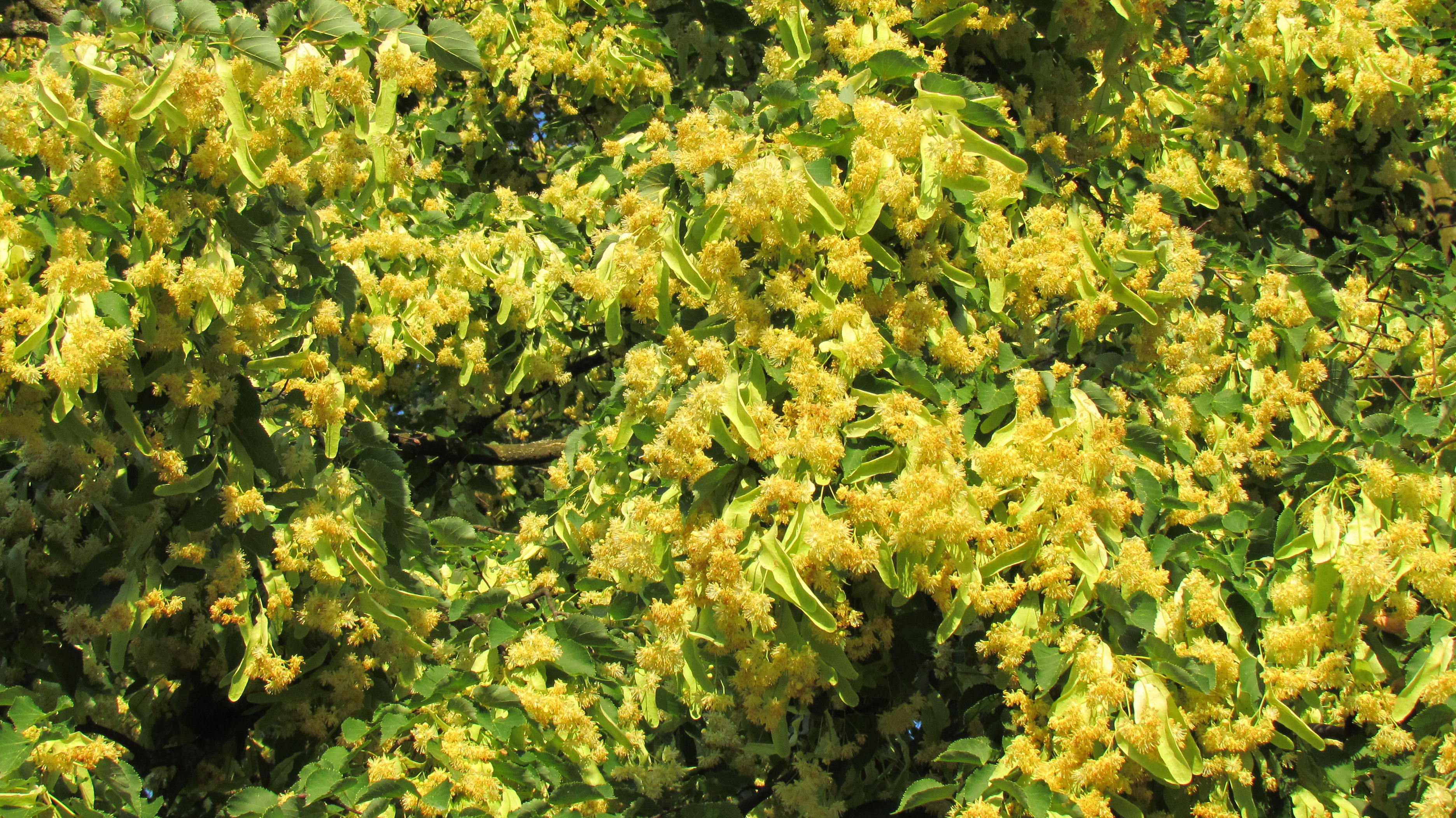 Velikolistna lipa v cvetju, Ljubljana, Nove Jarše